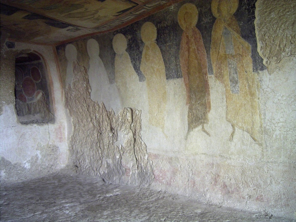 Felskirche Ivanovo Fresken im Naos